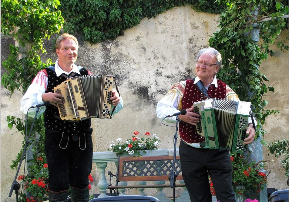 Viki Ašič starejši in Viki Ašič mlajši na festivalu Vurberk 2013.